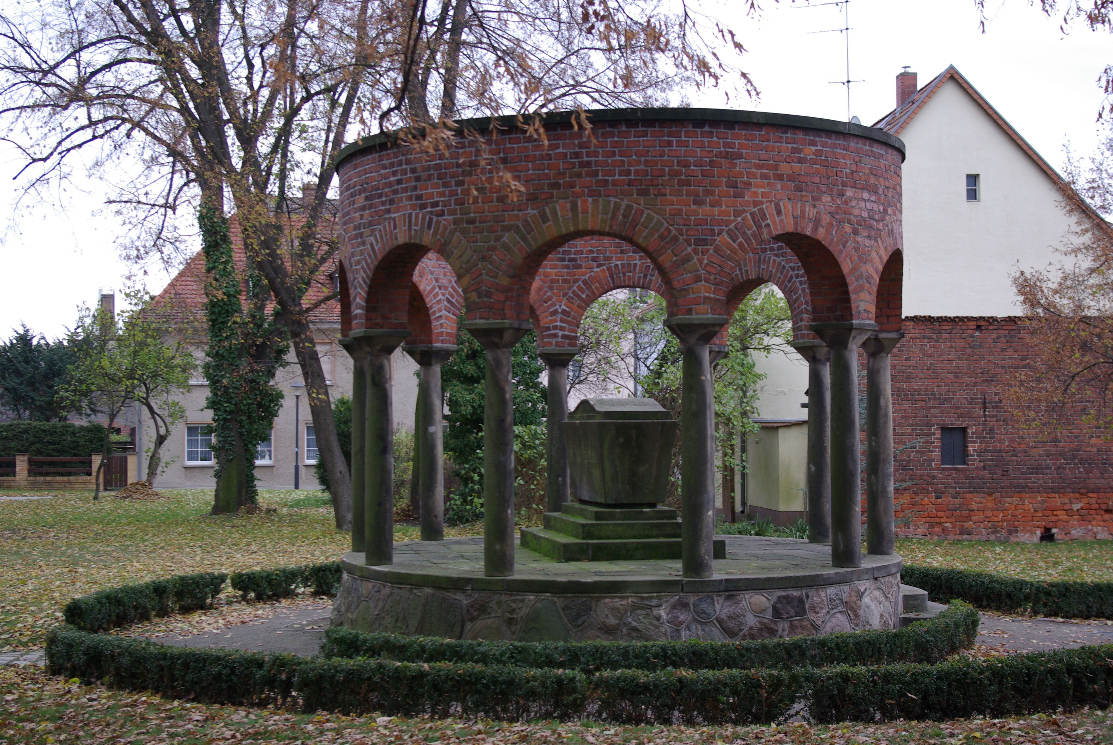 Jüterbog in Brandenburg. Das Denkmal soll an die Toten des Ersten Weltkriegs erinnern. Es steht zwischen Große Straße und Nicolaikirche.